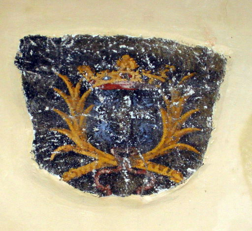 Châtelperron (Frankreich) - Kirche - Fragment eines Trauerbandes mit dem Wappen der Charry des Gouttes